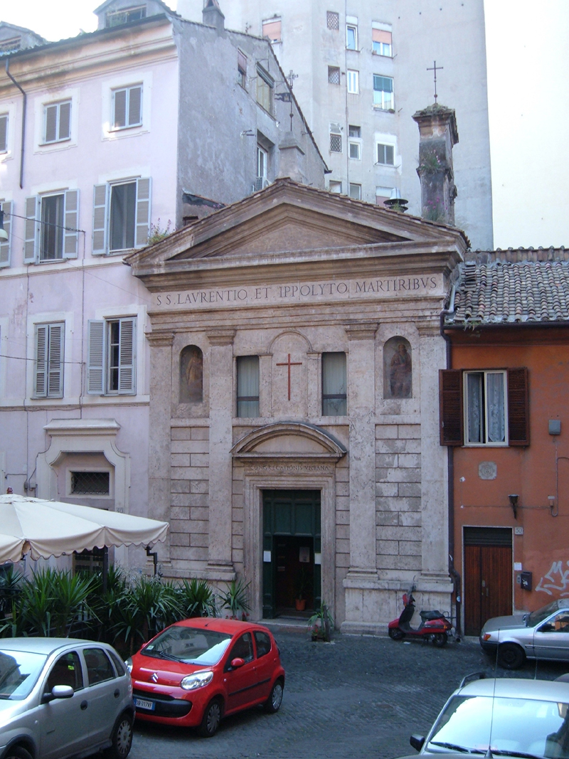 Chiesa di San Lorenzo in Fonte, a Roma, nel rione Monti. Foto personale.